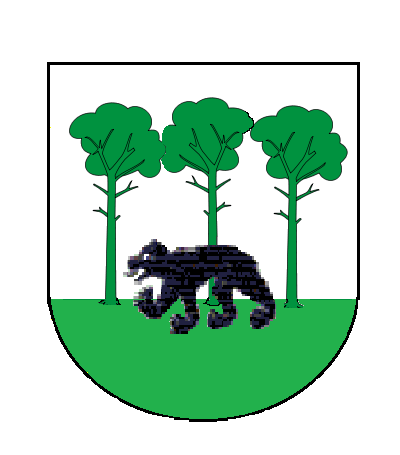 Escut antic d'Alins (Pallars Sobirà)